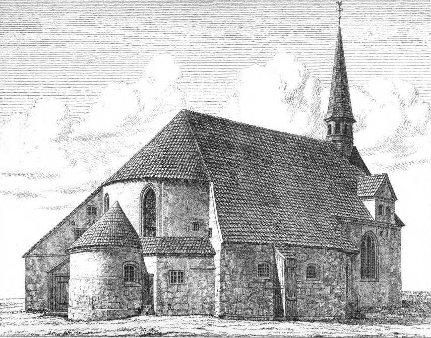 Sankt Michaelis Kirke Slesvig i 1860